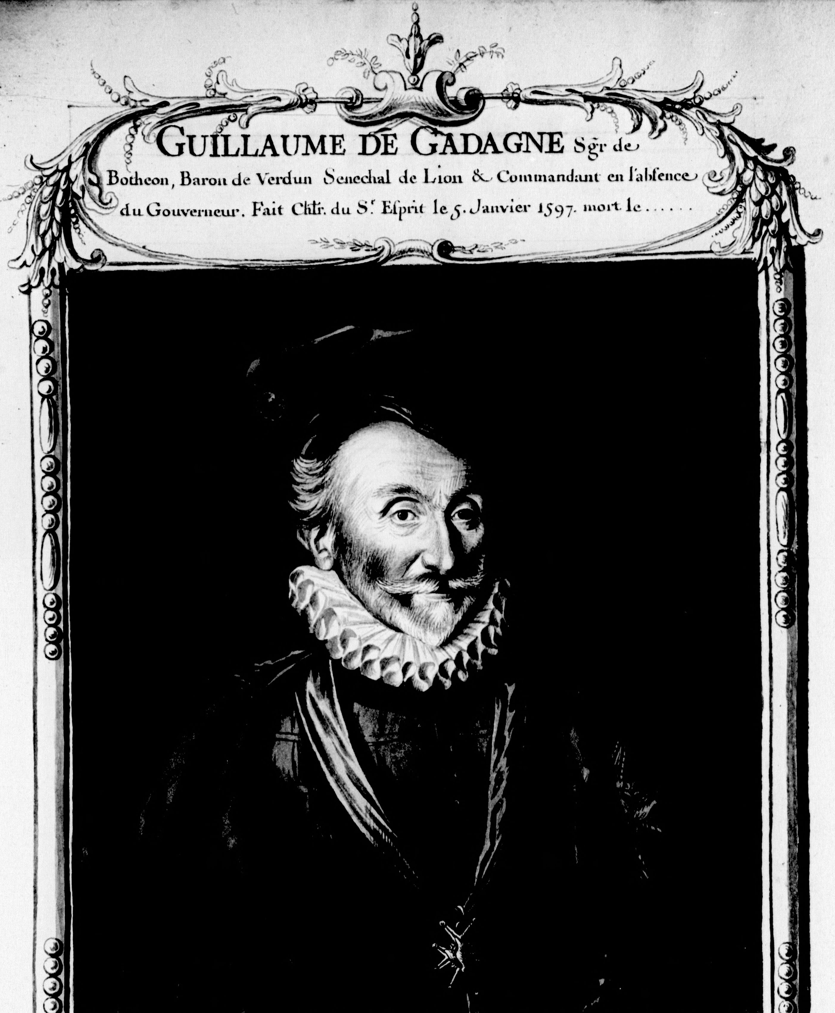 Portrait de Guillaume de Gadagne (1534-1601), chevalier de l'Ordre du Saint-Esprit